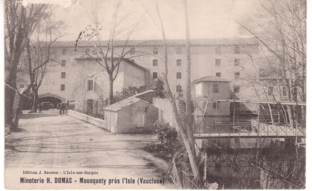 Vieille carte postale du Moulin de Mousquety